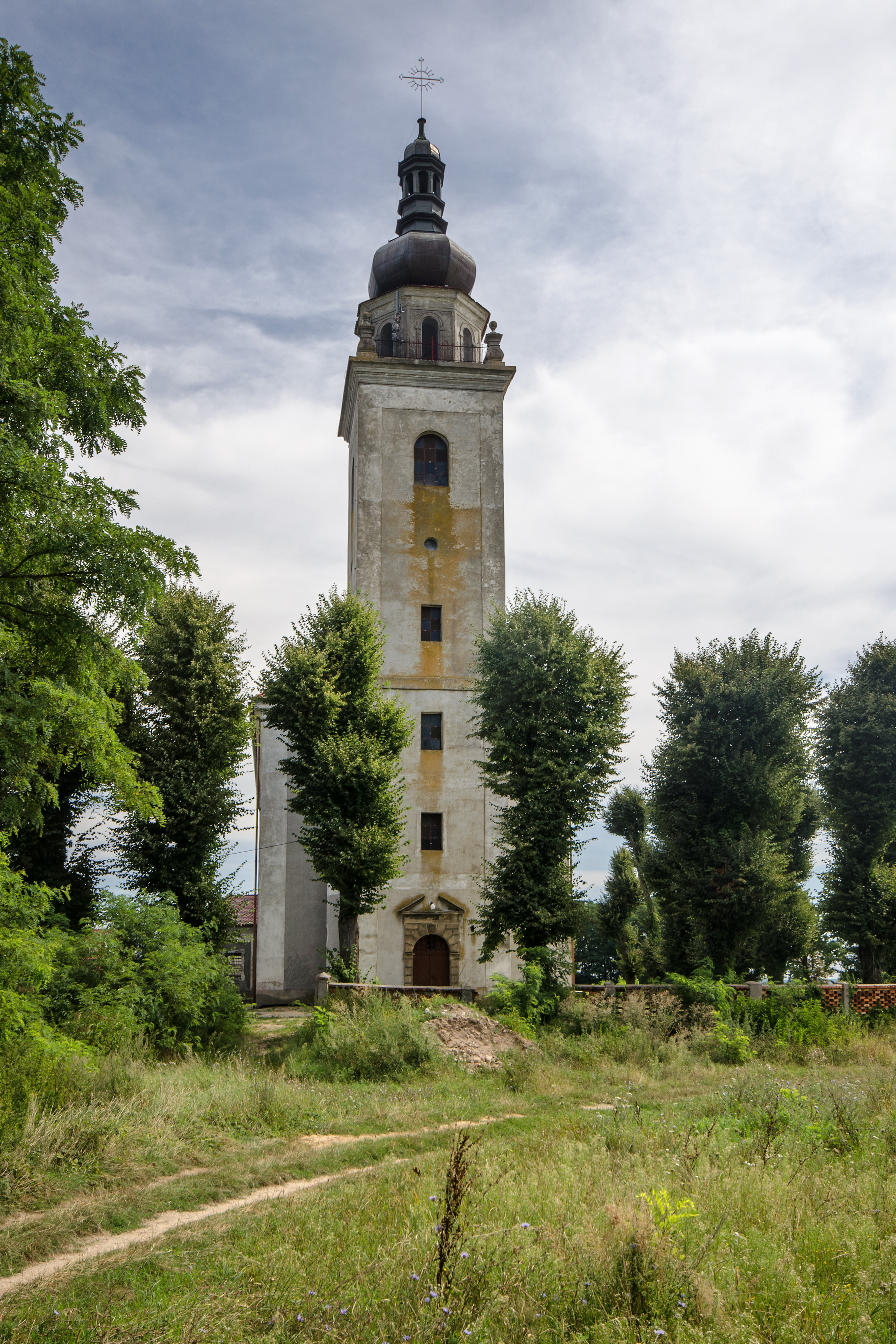 Smogorzów Wielki - rzymskokatolicki kościół parafialny pw. św. Michała Archanioła, 1700-1702, 1957